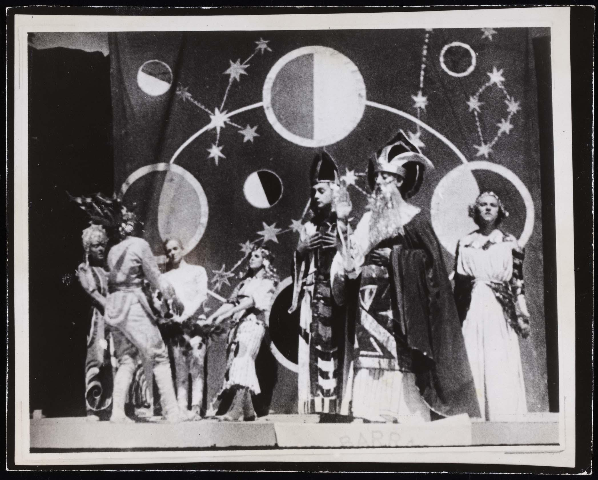 La Barraca. Escena con decorados de Benjamín Palencia del auto sacramental «La vida es sueño», de Calderón de la Barca (1932). Fotografía anónima. Colección del Museo Nacional Centro de Arte Reina Sofía, Madrid, España